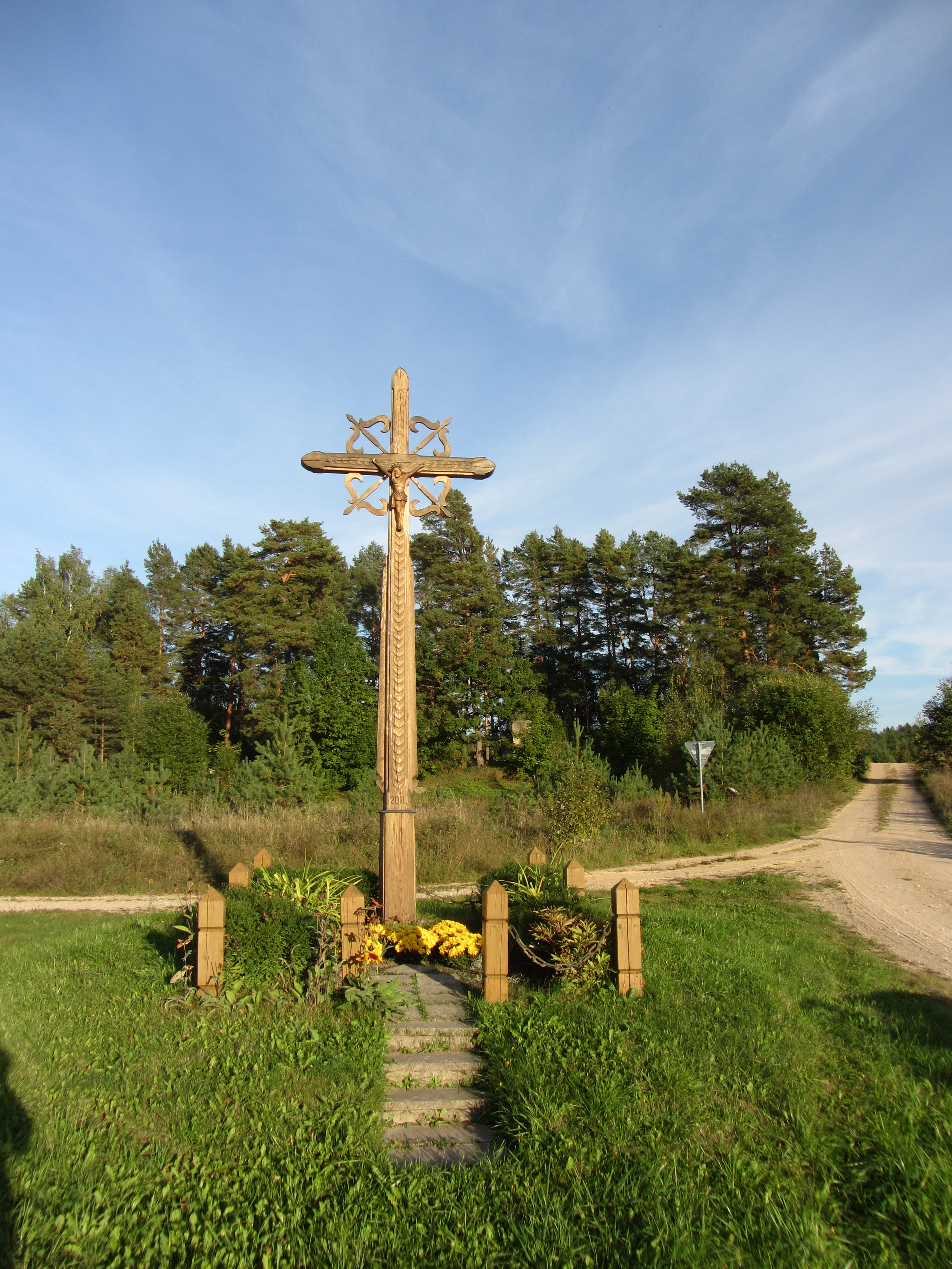 Aučynos 18101, Lithuania